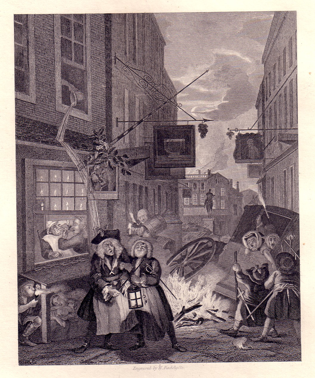 Die Tageszeiten (The times of the day) – Nacht (Night) von William Hogarth, Stahlstich um 1860 * Quelle: William Hogarth - The Complete Works * Scan: 200 dpi * Eingescannt von: Henryart in dessen Eigentum sich das Werk befindet